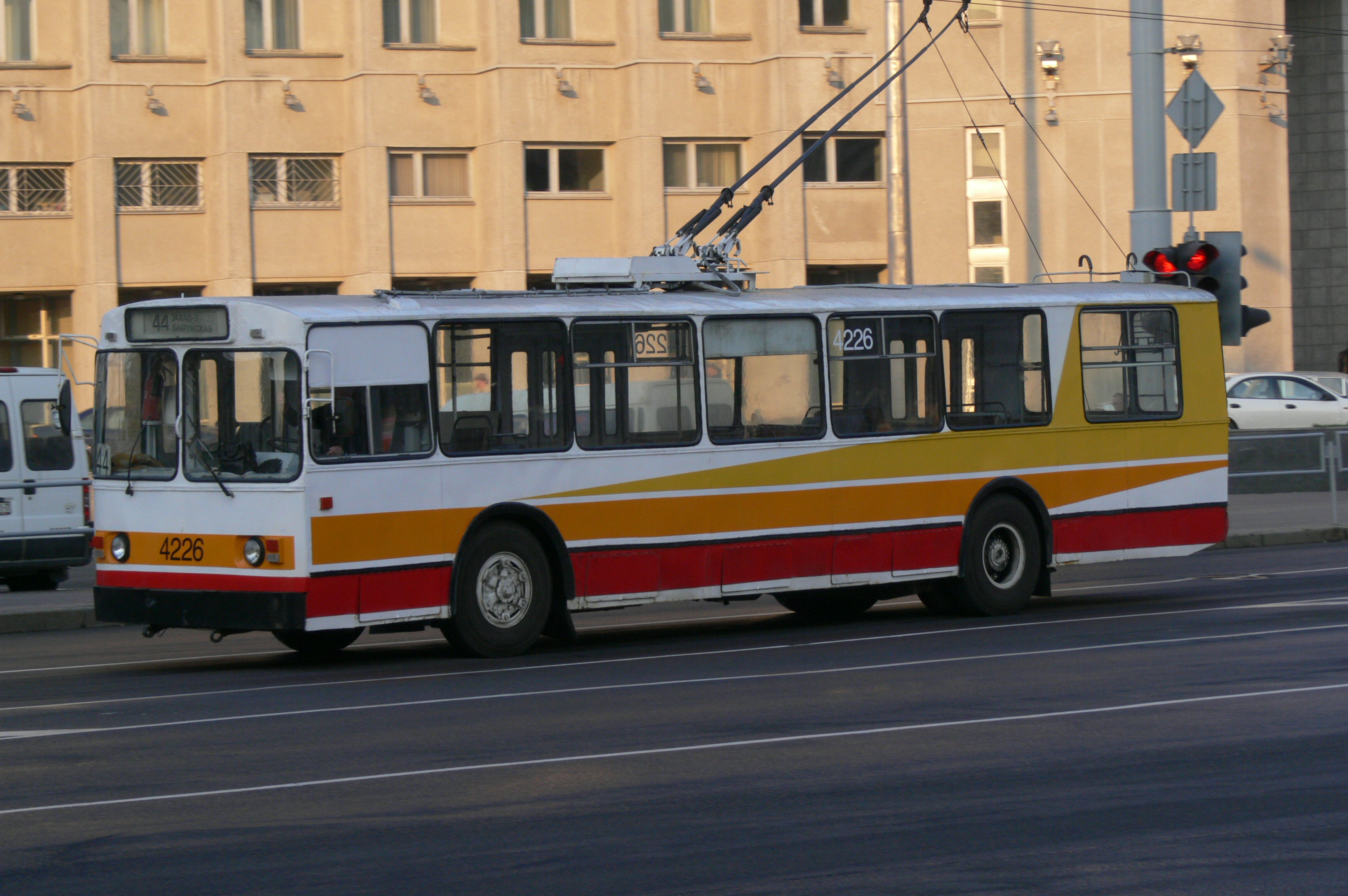 Trolleybus ZiU-682g in Minsk